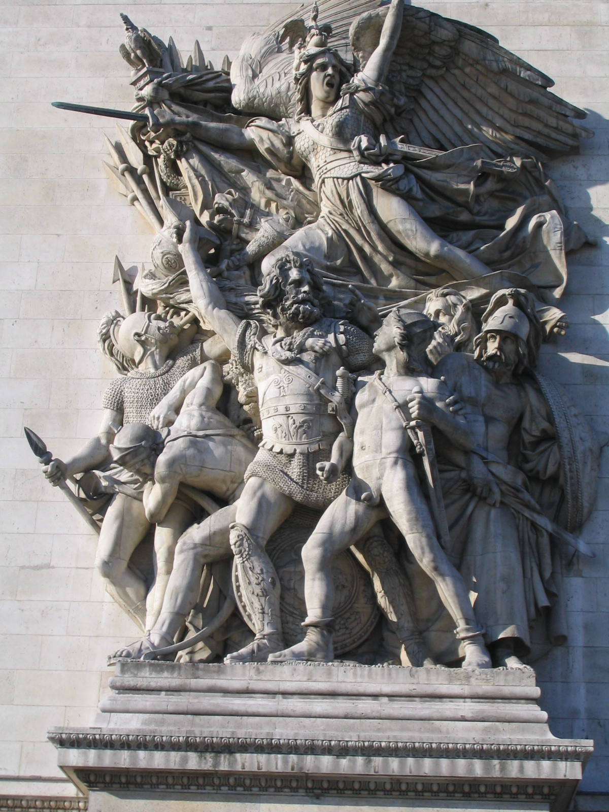 La Marseillaise by François Rude on the Arc de Triomphe, Paris.